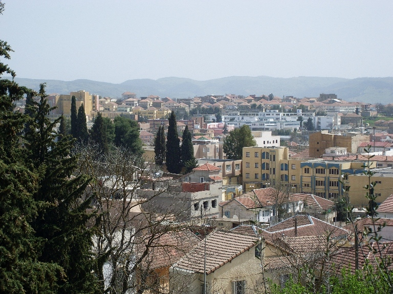 bab el gort باب القرط